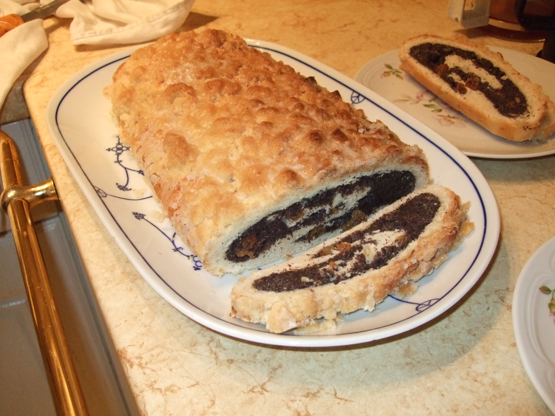 Ein schlesischer Mohnkuchen, auch Mohnstollen genannt.